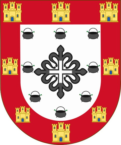 Blasón de la primogénita Casa de Villegas: en campo de plata con una cruz flordelisada de sable cantonada de ocho calderones de sable cuyas asas están formadas por dos cabezas de sierpe de sinople cada una, y orlada de gules cargada de ocho castillos de oro con puertas y ventanas en azur.